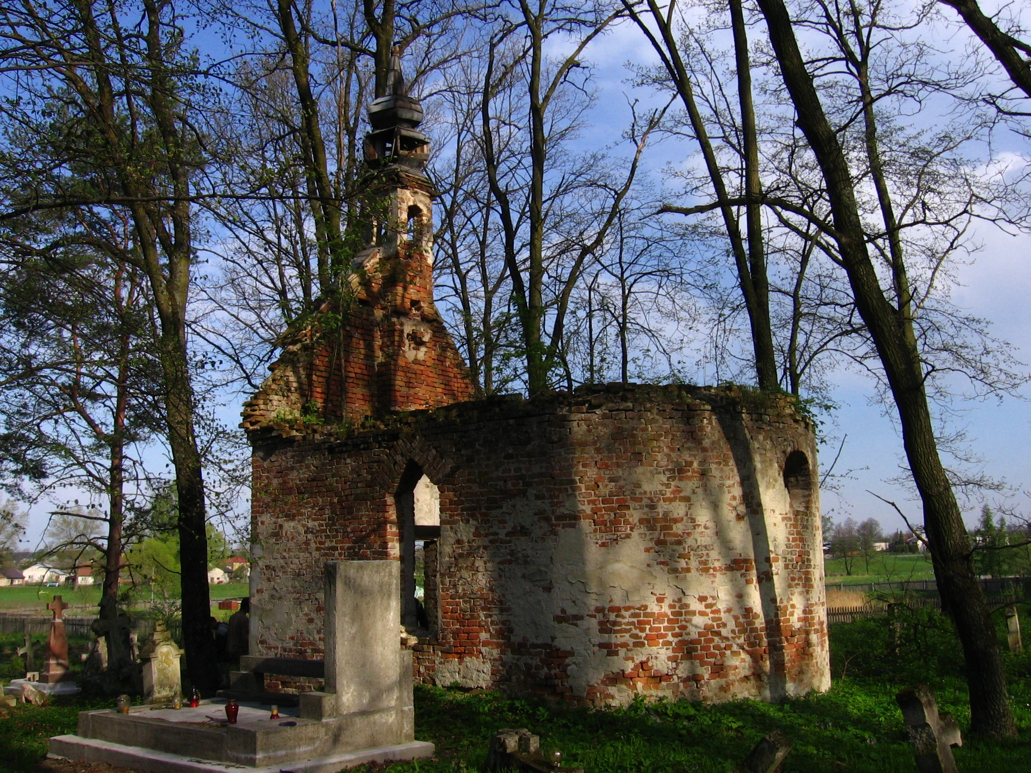 Żuków, ruiny cerkwi